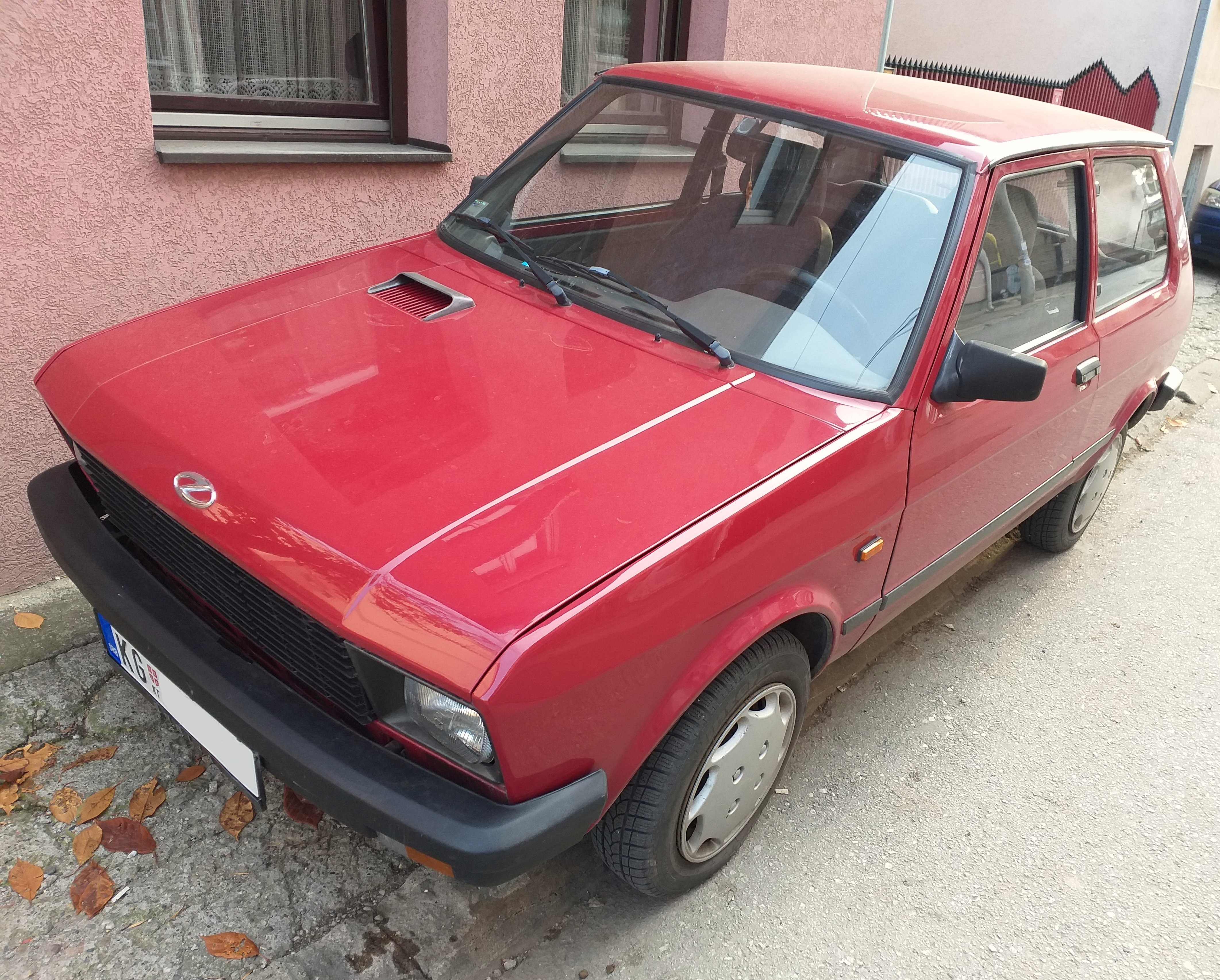 Srpski (latinica): Застава Корал 1.3